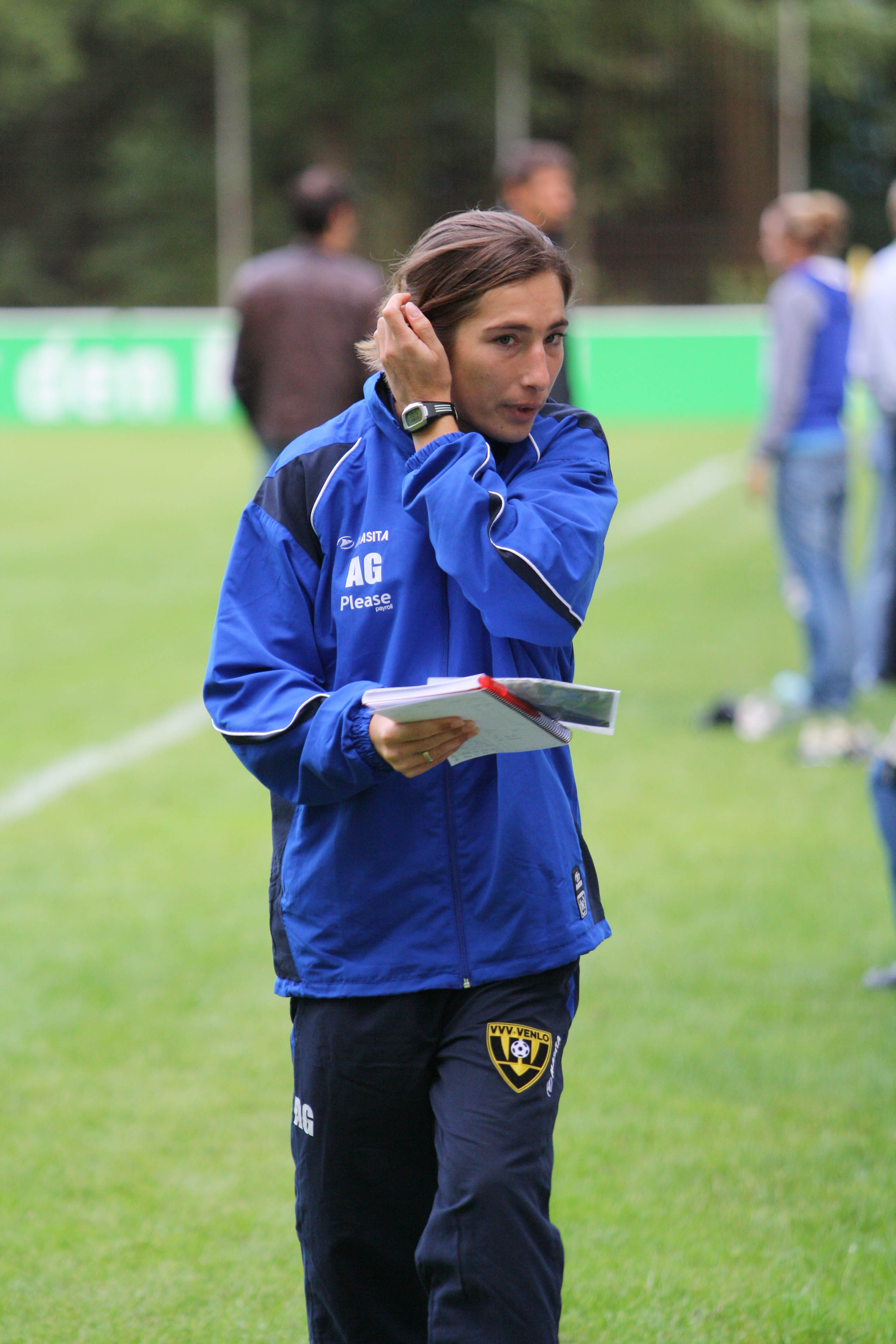 Annemieke Kiesel Weitere Fotos unter